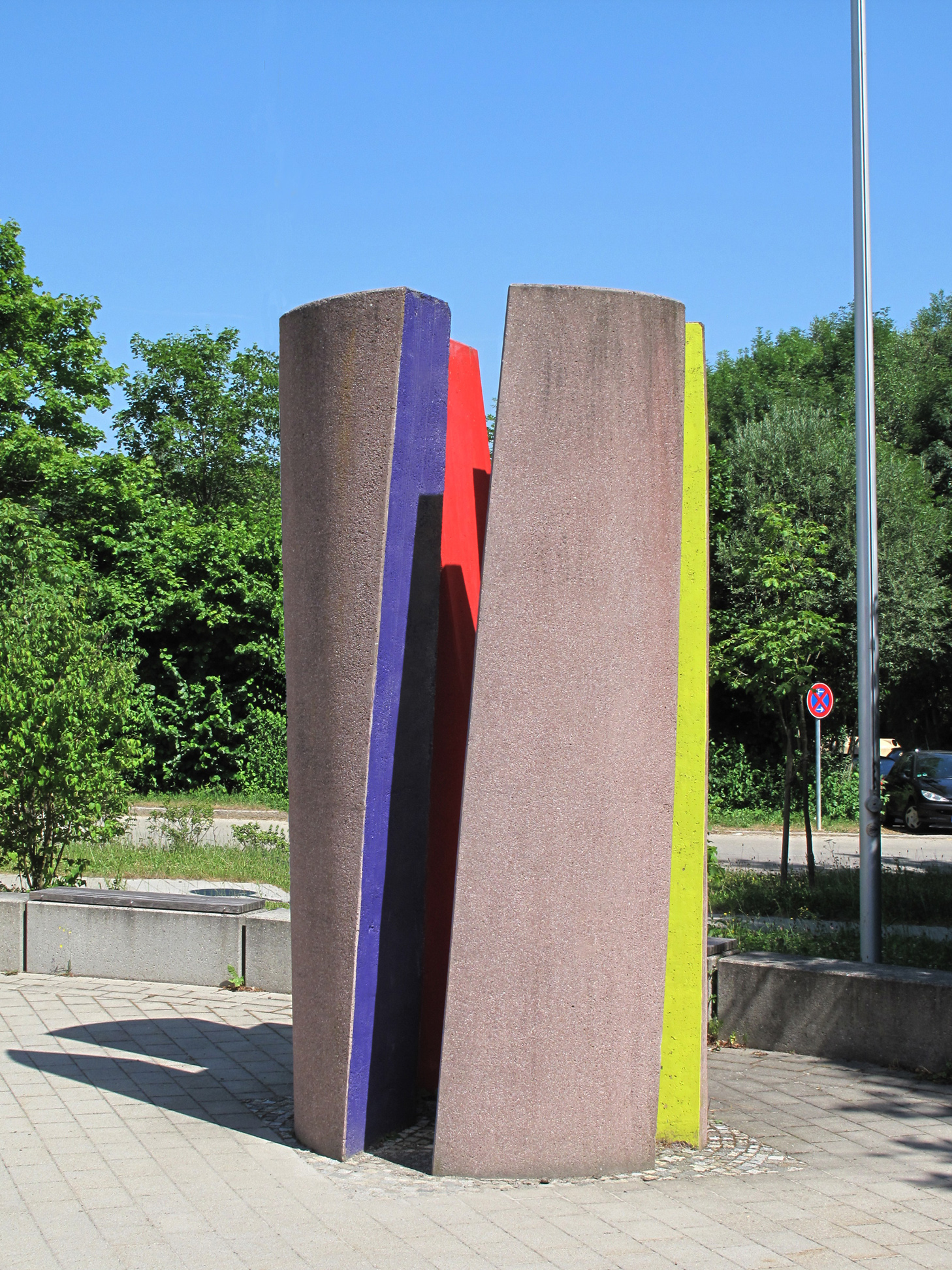 Herbert Volz, Dotternhausener Säule, 1989, - Kunstpfad Universität Ulm, Baden-Württemberg, Deutschland